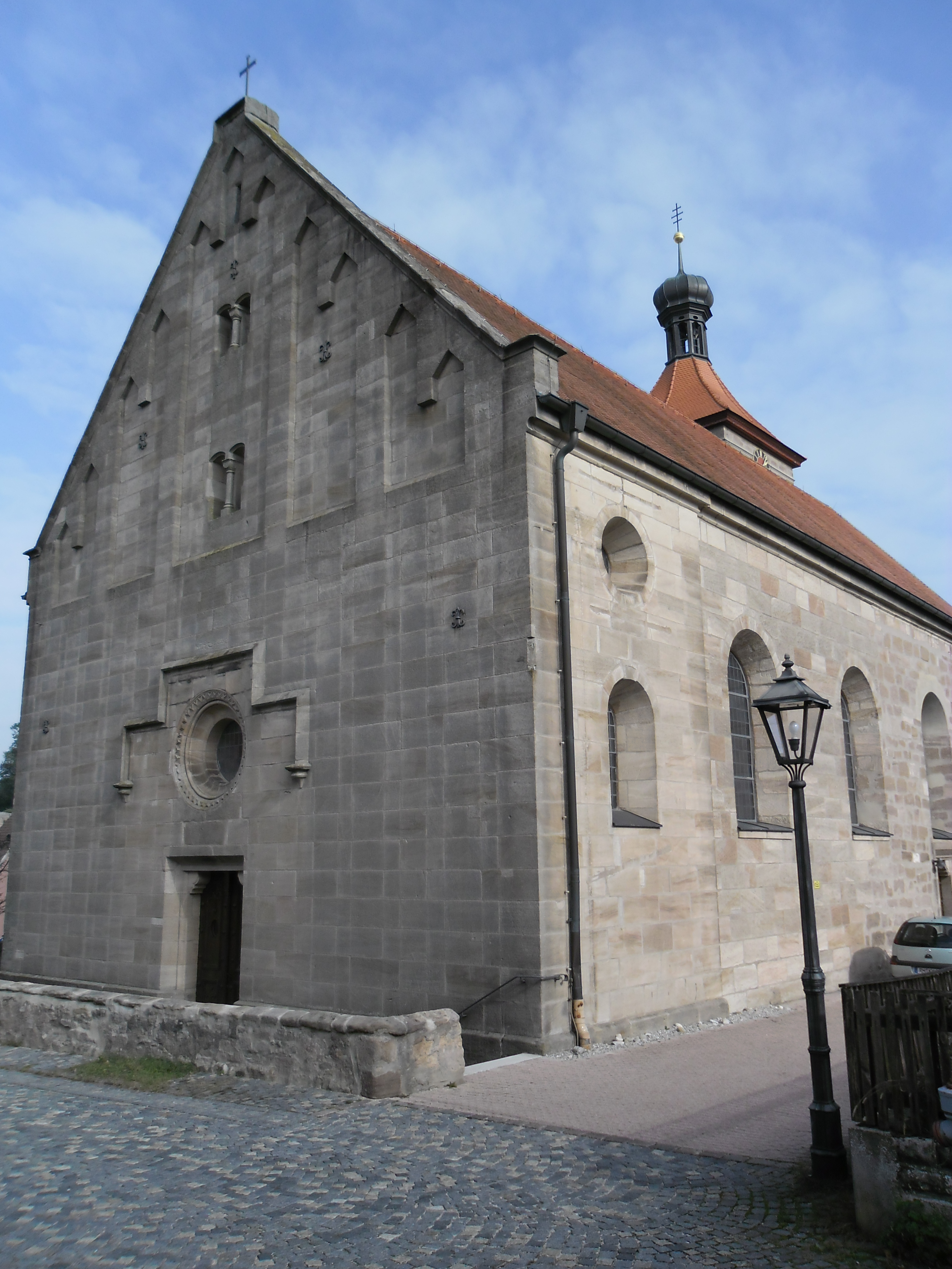 Die katholische Jakobskirche aus dem 15. Jahrhundert entstand in ihrer heutigen Form größtenteils während zweier Erweiterungen im Barock (1624/27) und Klassizismus (1854/57)